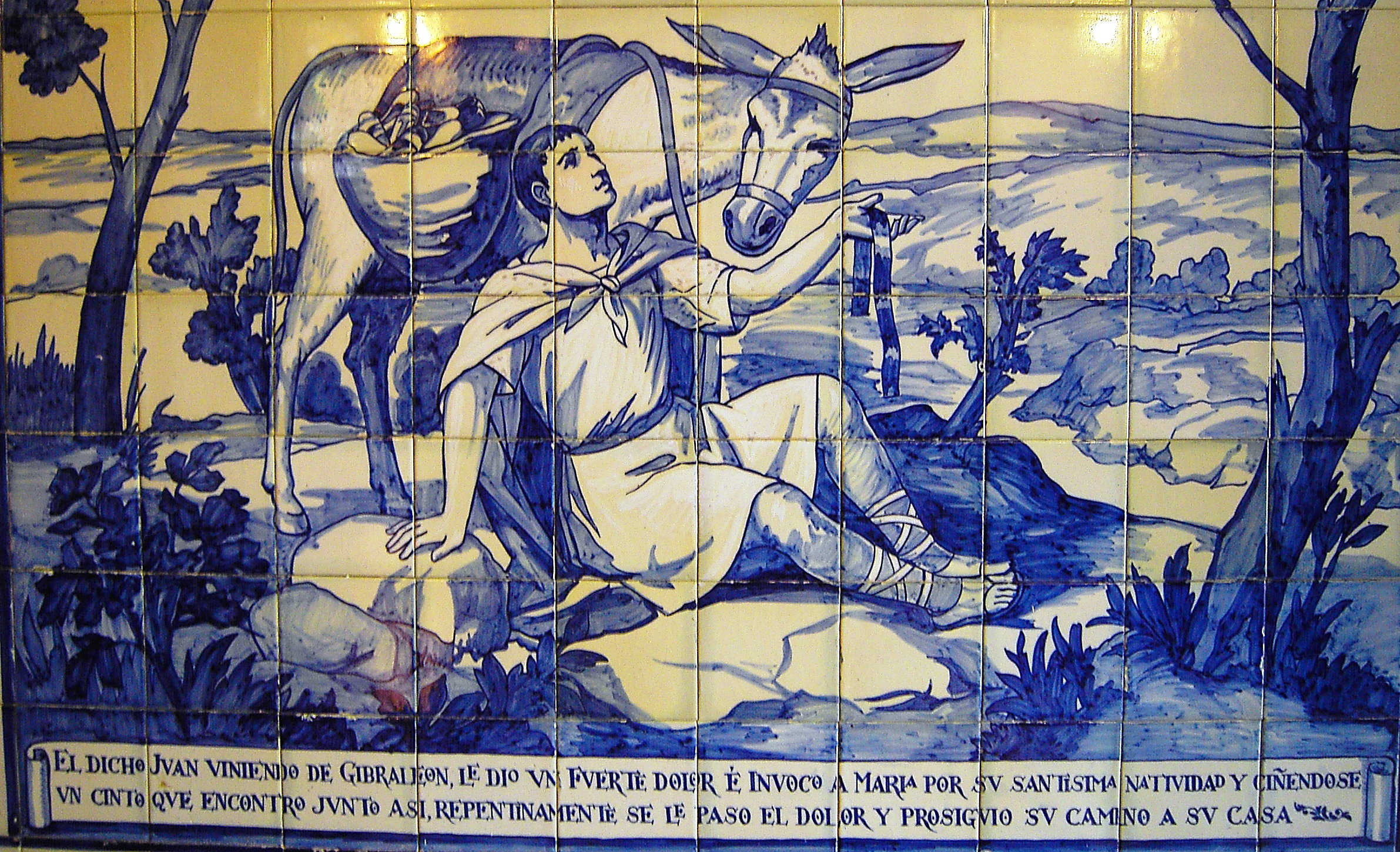 Detalle de azulejo en la ermita de la Cinta de Huelva, obra de Daniel Zuloaga Boneta.